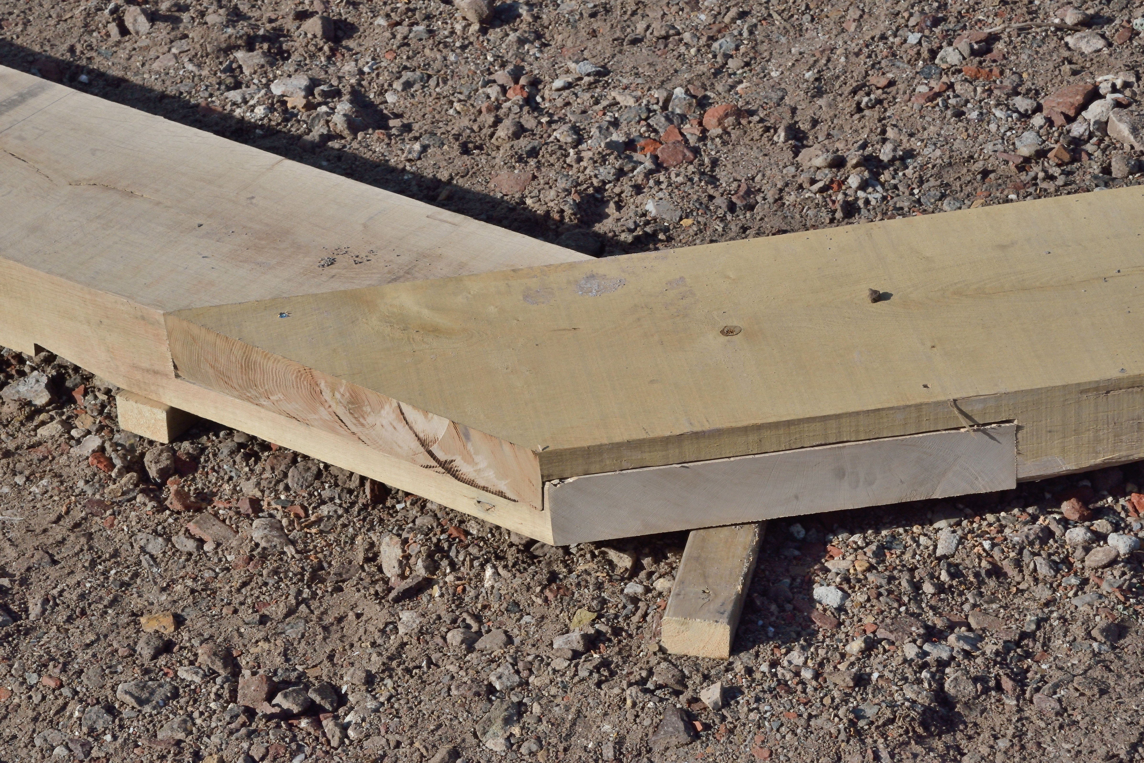 Puurveense molen, opbouw achtkant, boventafelement